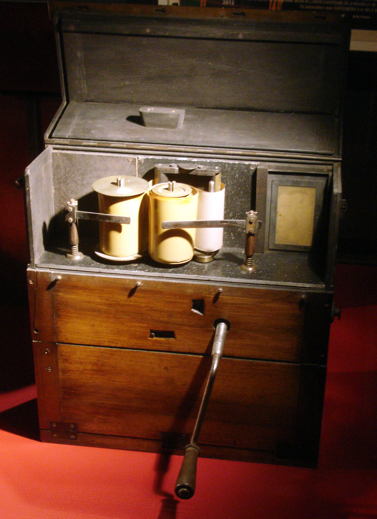 Caméra Biographe à pellicule de 58 mm, inventée par Georges Demenÿ, magasin ouvert (1895). On voit les deux petites bobines devant la fenêtre de prise de vues au bord droit de laquelle se trouve le doigt de la came battante.